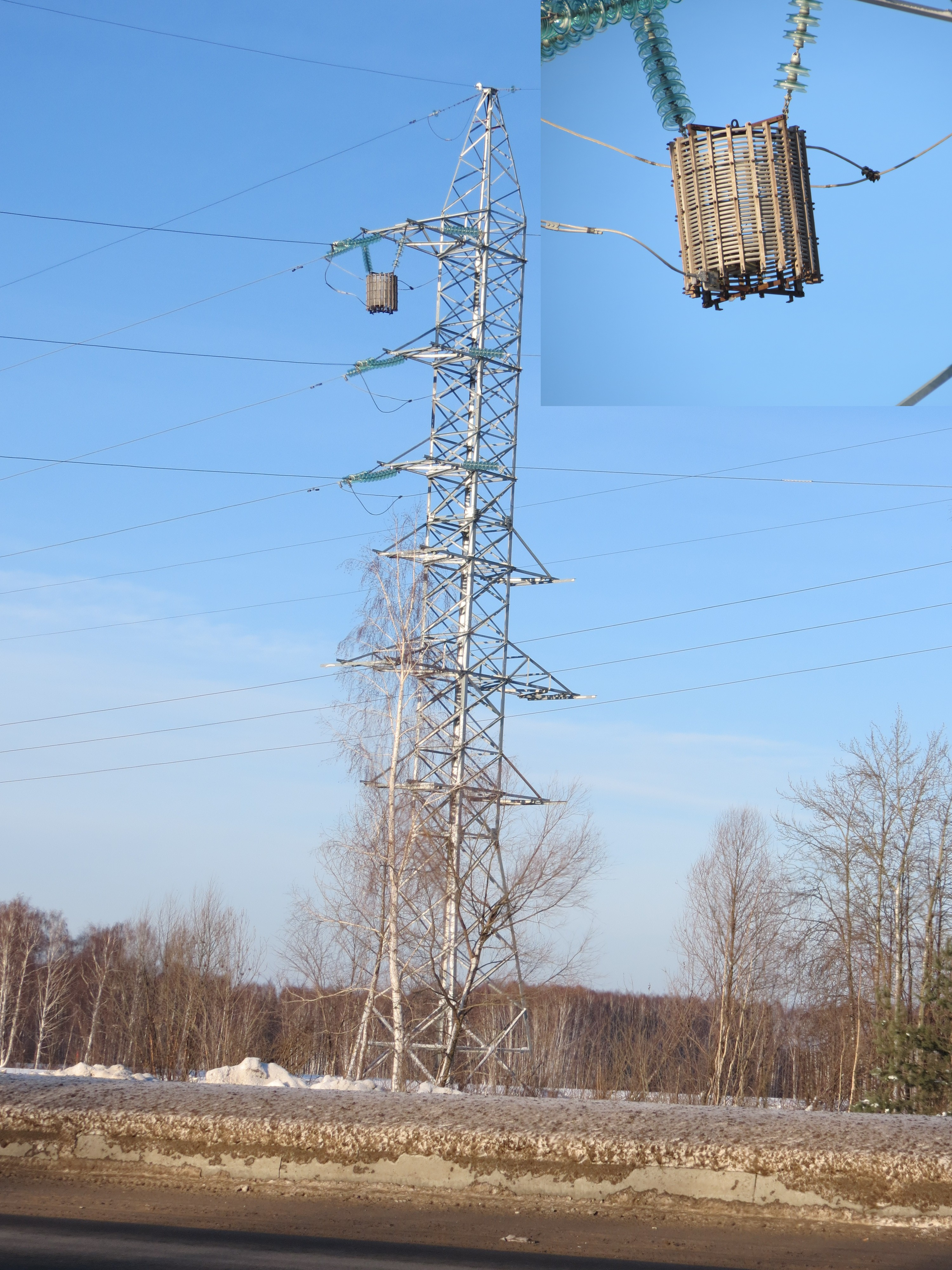 Высокочастотный заградитель